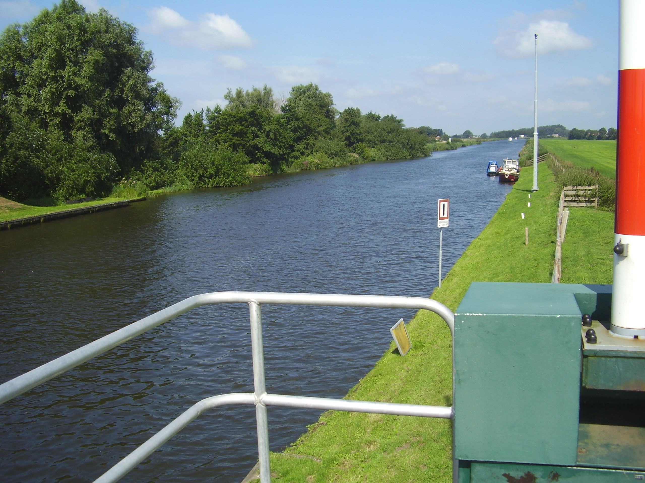 De Jonkersvaart bij Nijetrijne in gemeente Weststellingwerf, provincie Friesland